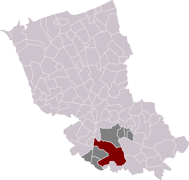 Carte de localisation de la commune de Morbecque / Map of localisation of the municipality of Morbecque